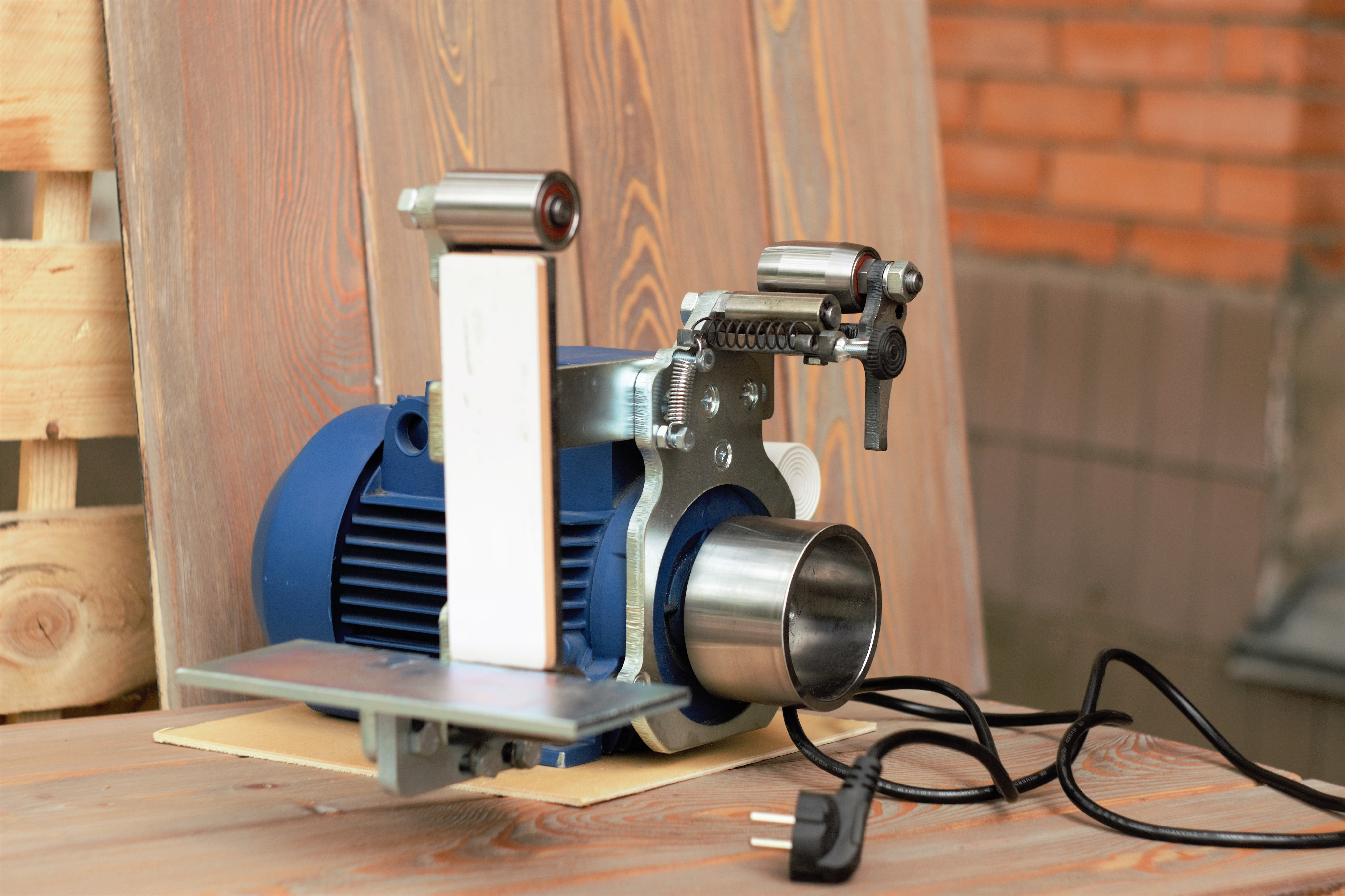 Заточной станок мини-гриндер настольный